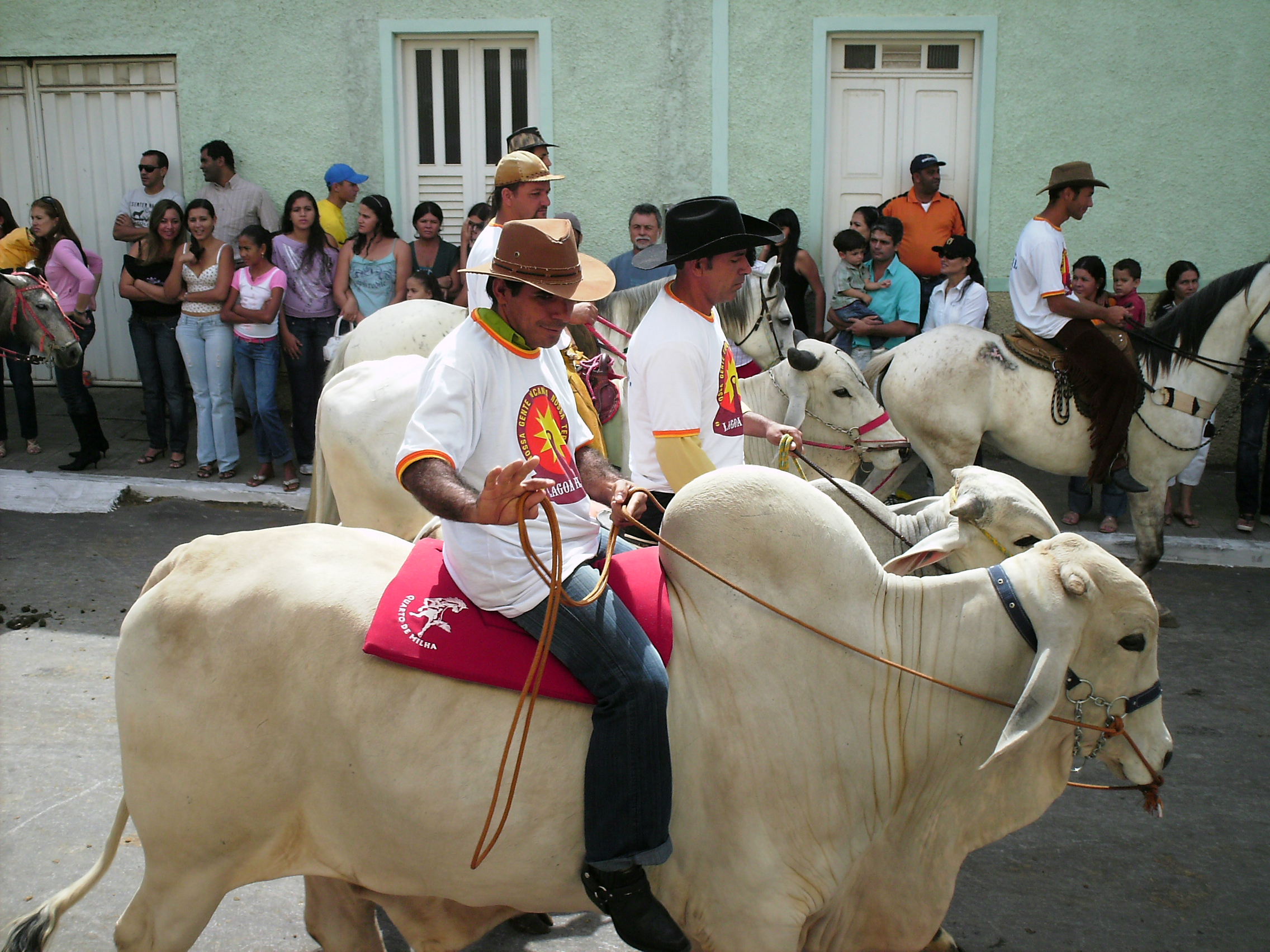 Desfile cívico de 2 de Julho - Caetité, Bahia - Boi de montaria